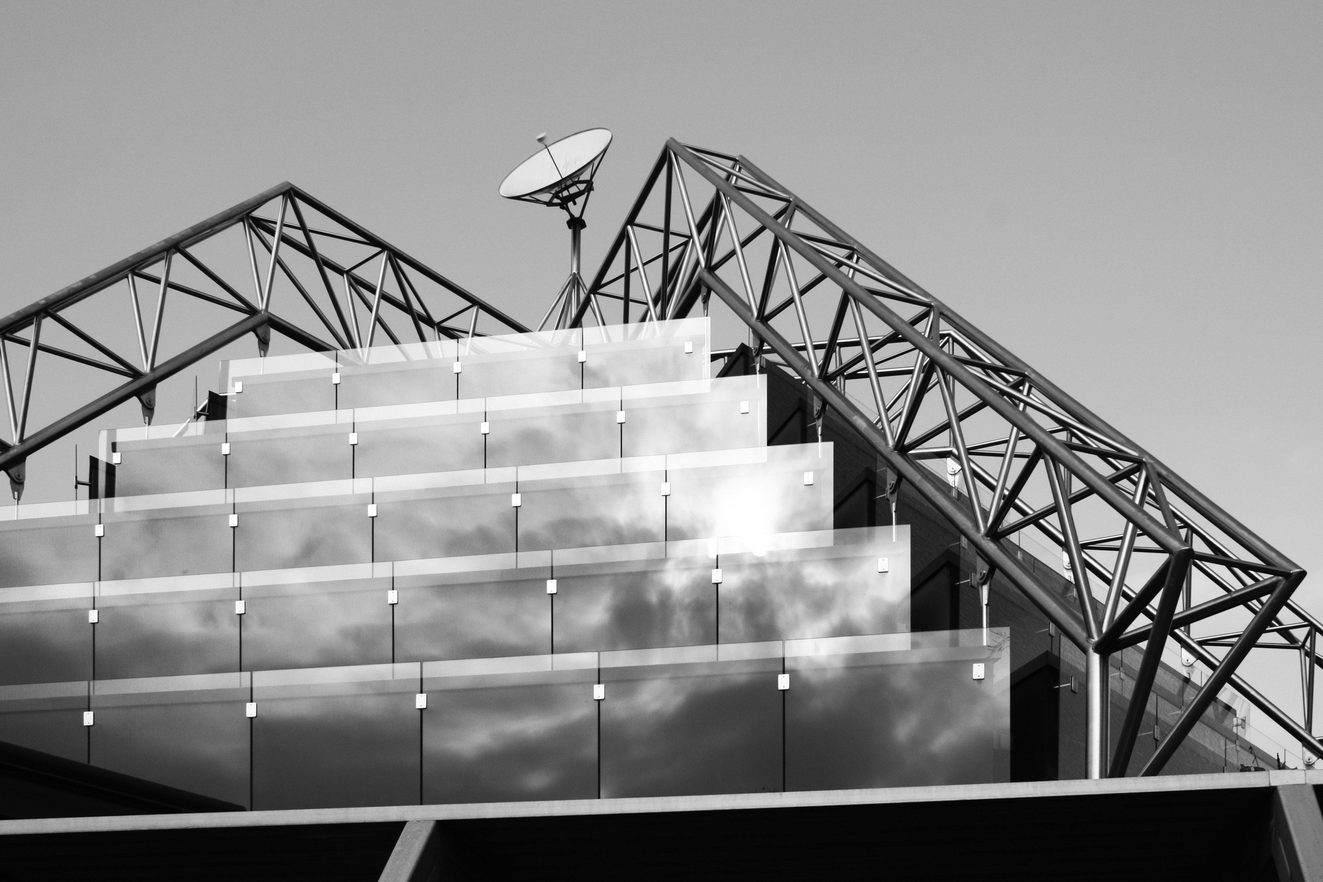 Wilfried Beck-Erlang: Planetarium in Stuttgart, 1970-77 (Detail Kuppel)